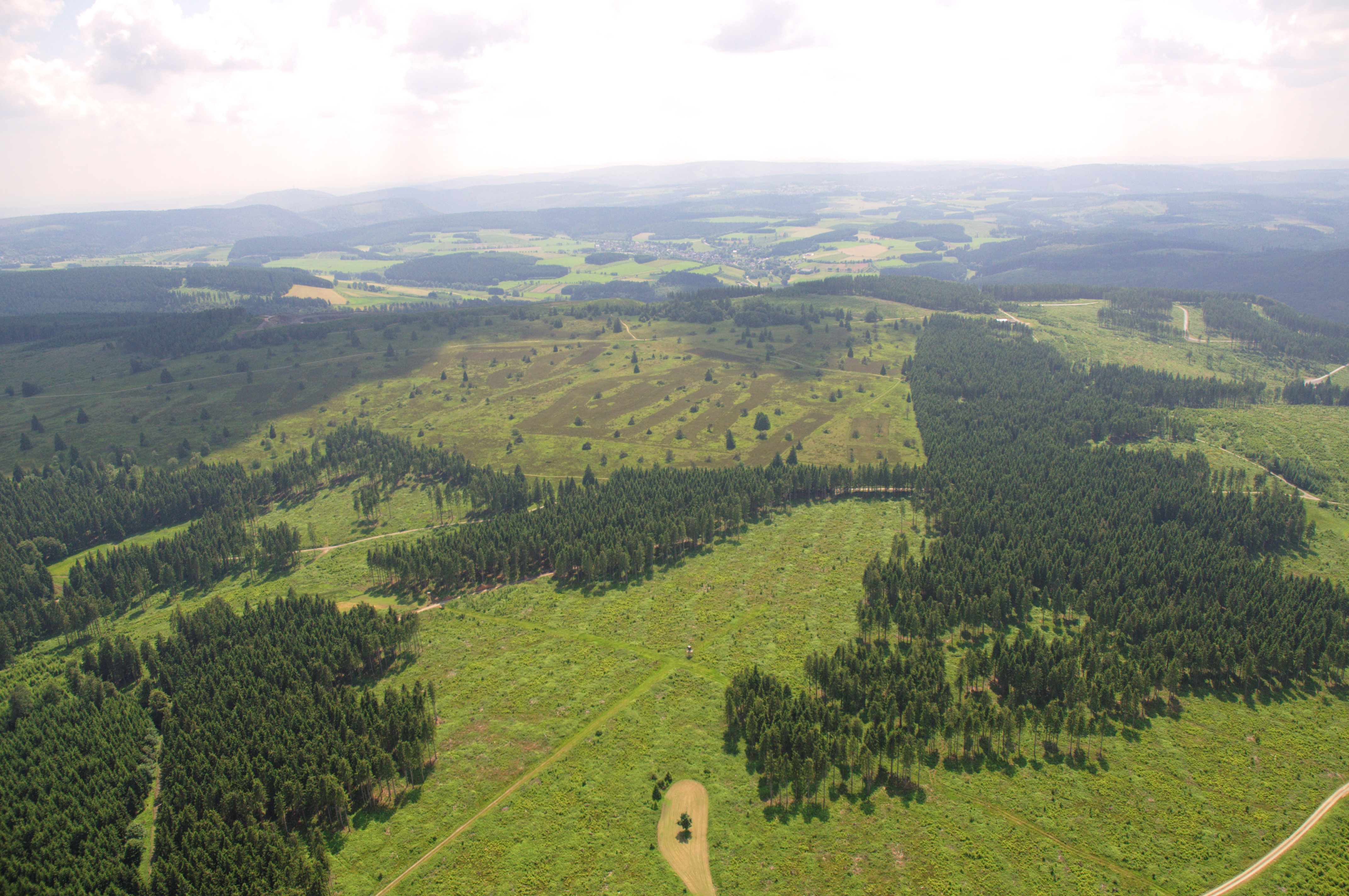 Fotoflug Sauerland-Ost: Niedersfelder Hochheide (Naturschutzgebiet Neuer Hagen, HSK-006) am Clemensberg nordöstlich von Niedersfeld, Rothaarsteig; Blickrichtung Süden. The making of this document was supported by the Community-Budget of Wikimedia Germany.